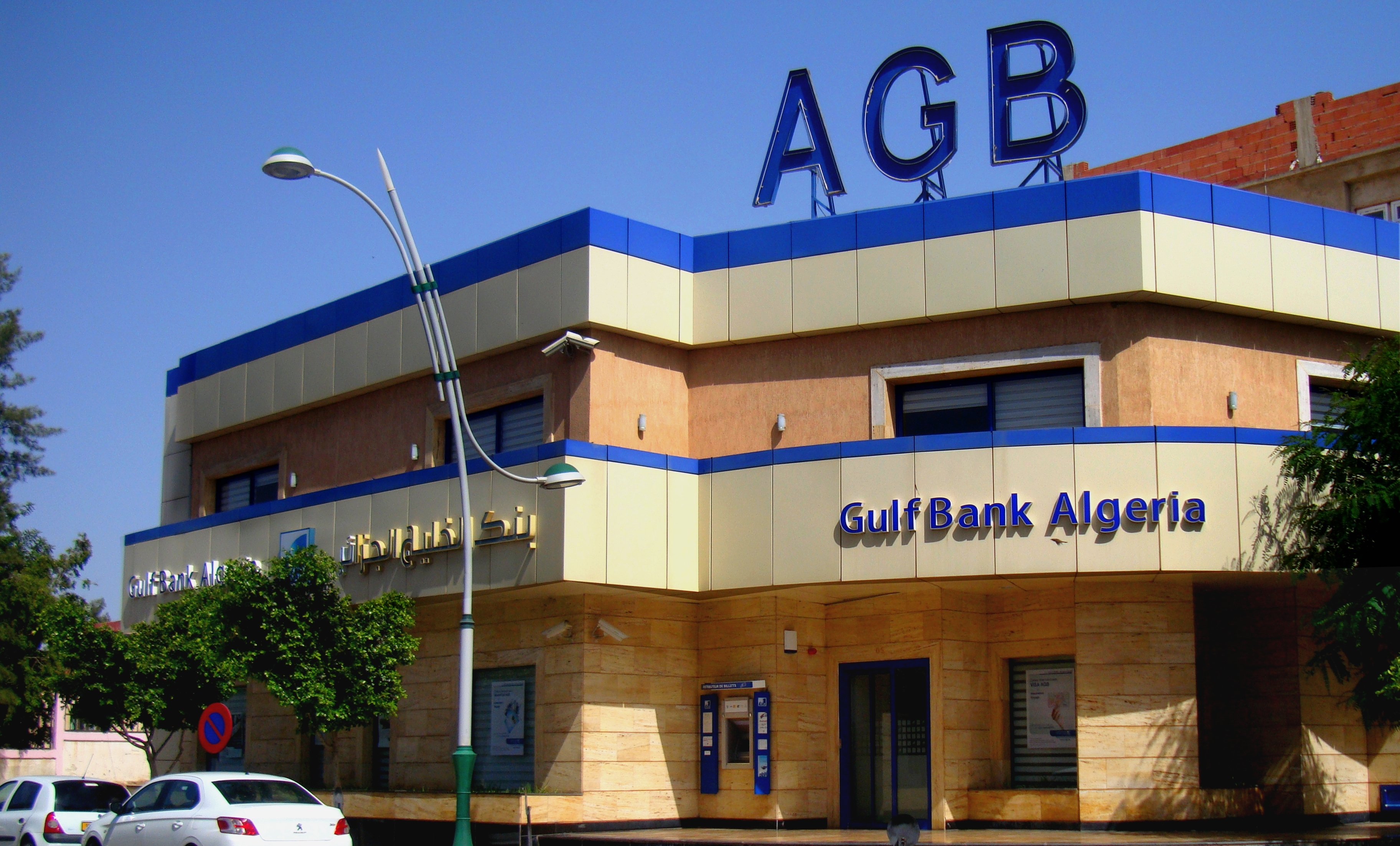 Banque AGB à Chlef